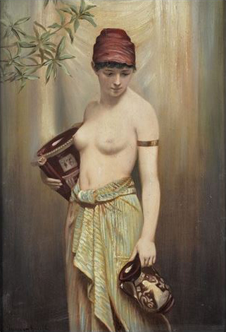 Vasenträgerin (Version) von Max Nonnenbruch (Öl auf Holz, 20 × 28 cm)